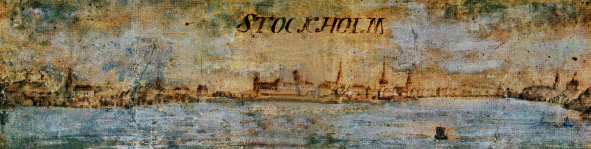 Gripenhielms Mälarkarta med vy över Stockholm från väst